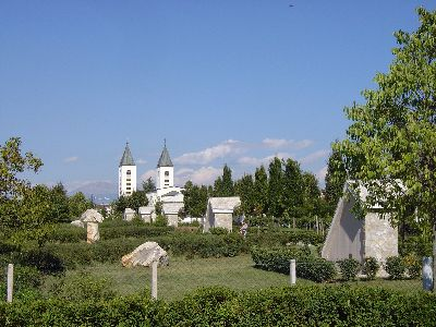 Eglise de Medjugorje